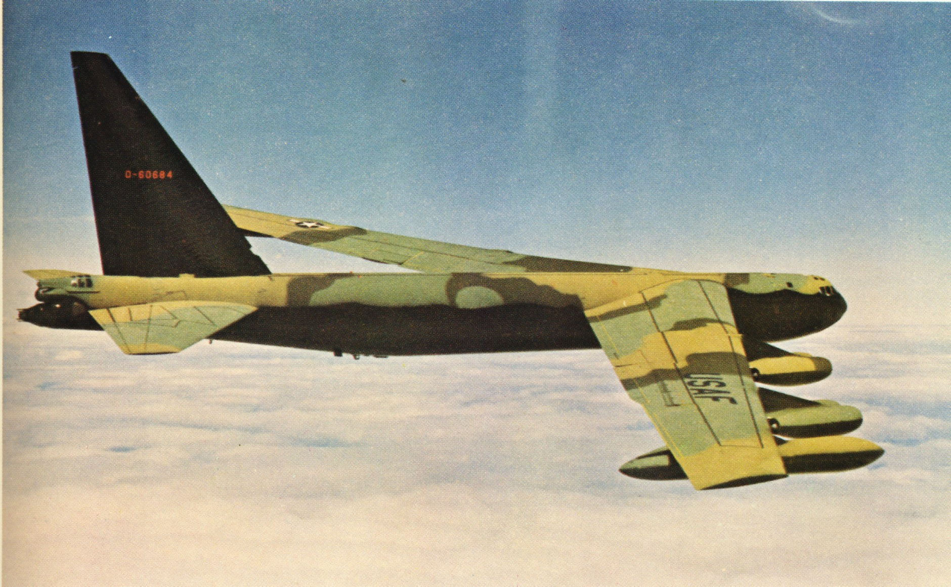 B-52D, 56-0684 (USAF) copy